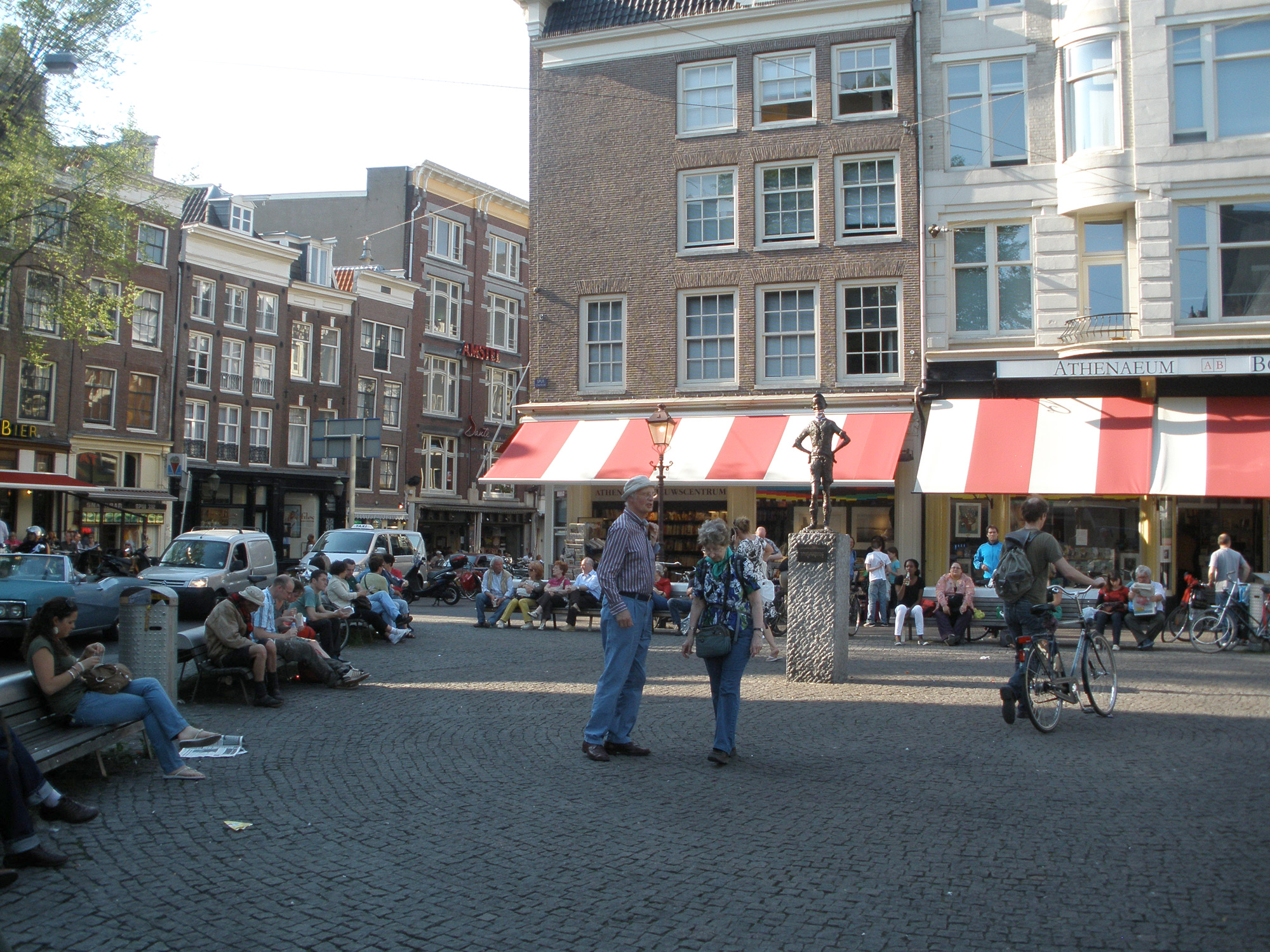 Spui square in Amsterdam